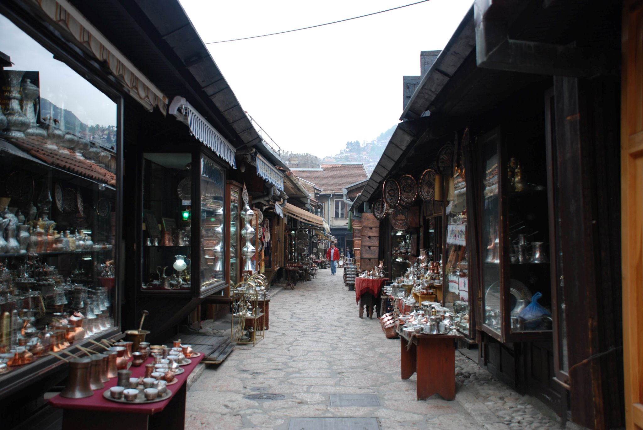 94385-Saravejo